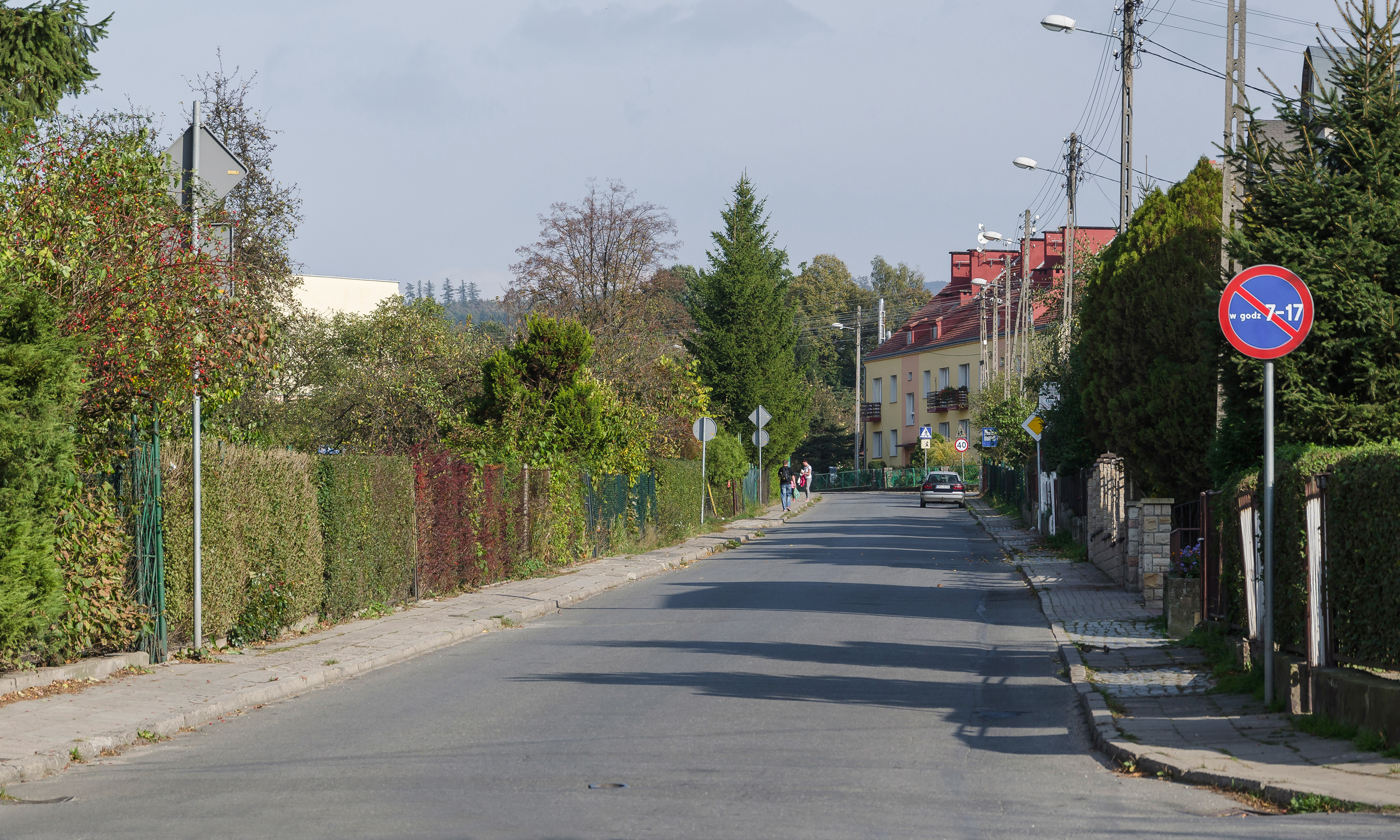 Kłodzko, ul. Sienkiewicza